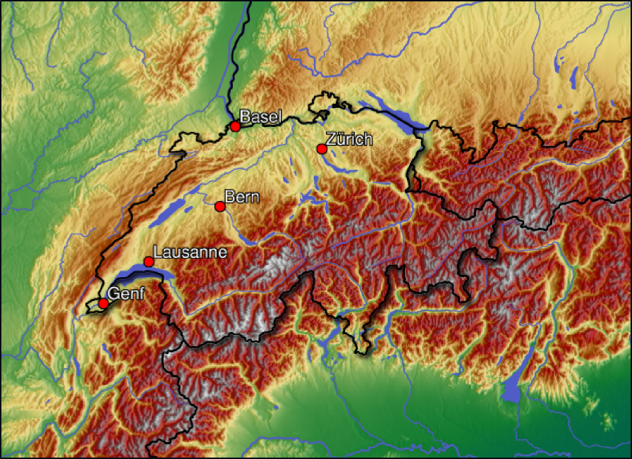 Carte Suisse Relief png